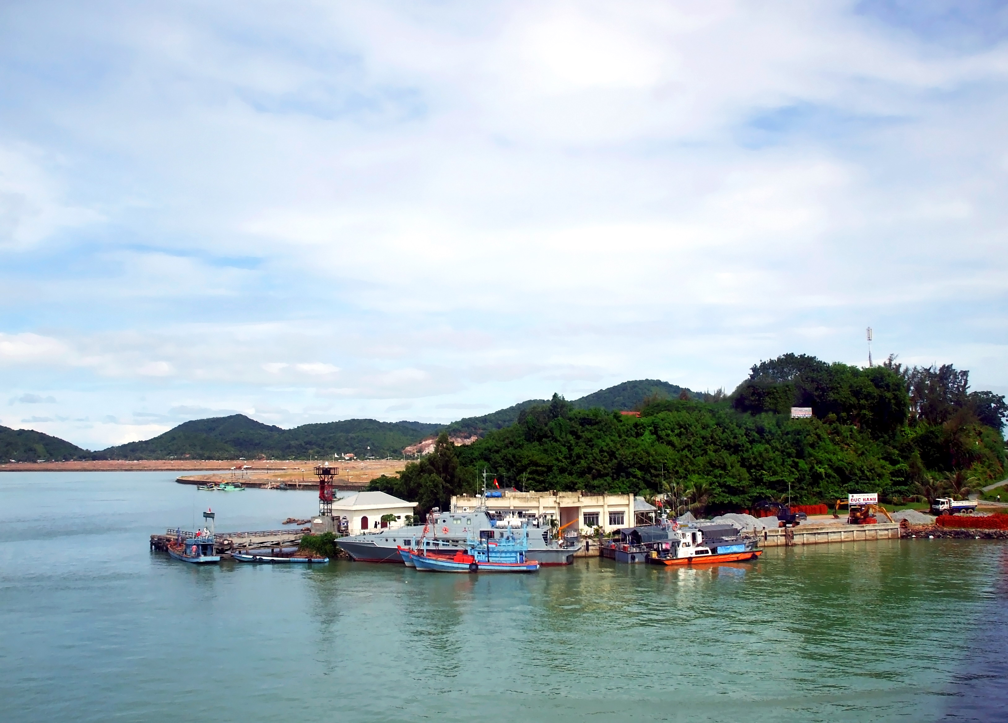 Pháo Đài, tên chữ là Kim Dự (Đảo vàng), một trong mười cảnh đẹp của Hà Tiên xưa.